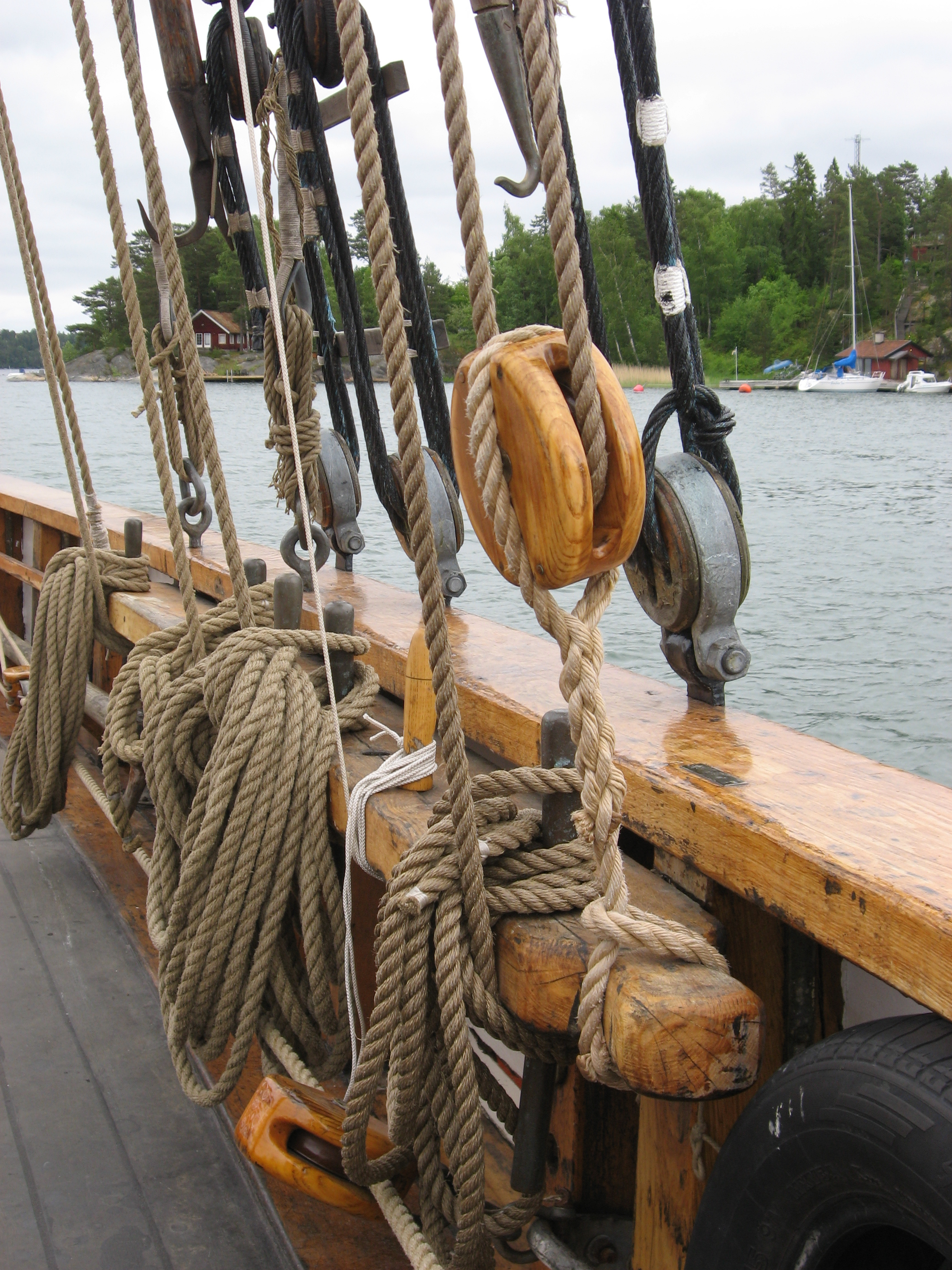 Sámegiella: Nagelbänk på Sofia Linnea